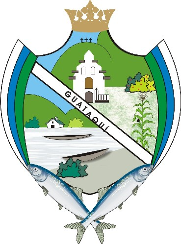 Escudo de Guataquí